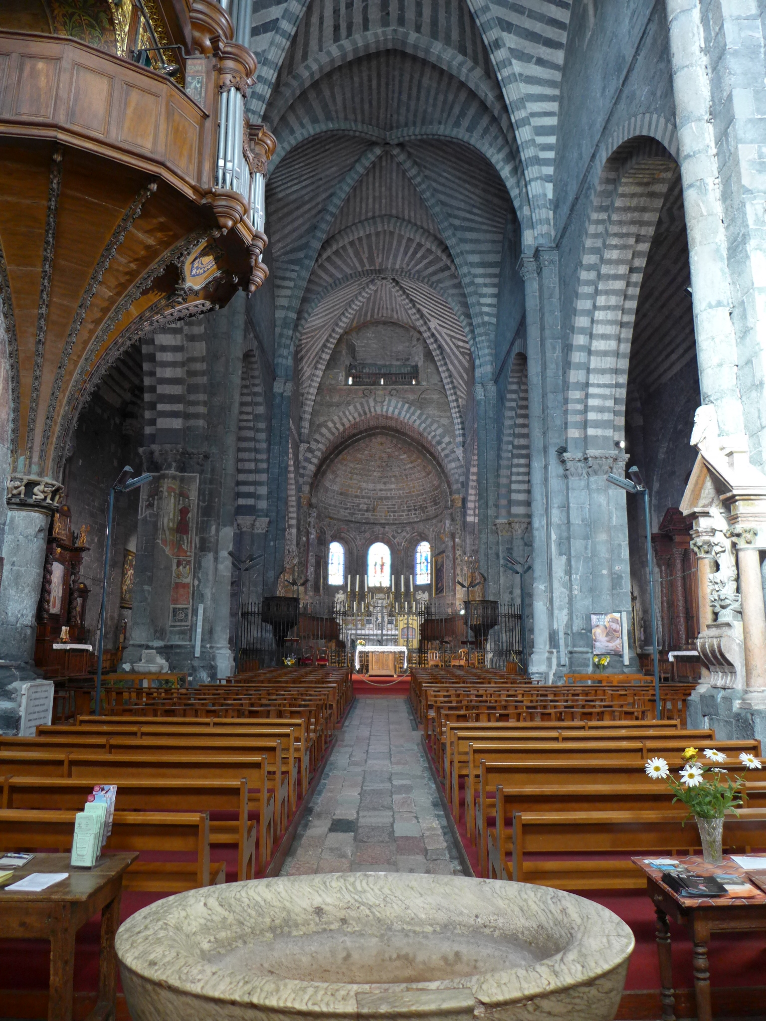 Intérieur de la Cathédrale Notre-Dame du Réal d'Embrun dans les Hautes-Alpes - France